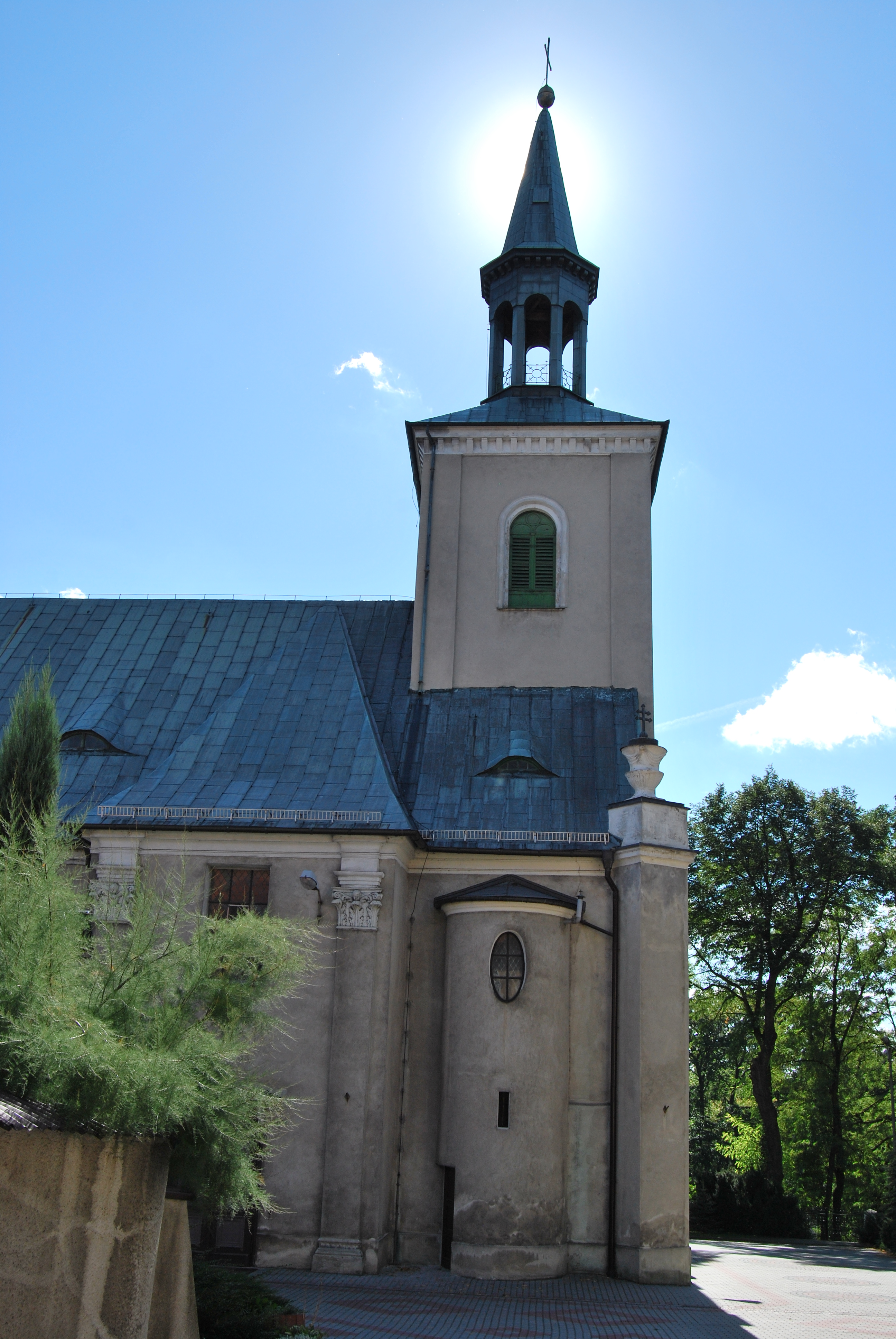 województwo śląskie, powiat gliwicki, gmina Toszek - Toszek , kościół pw. Św. Katarzyny Aleksandryjskiej (zabytek nr A/341/60)